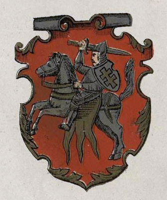 Беларуская (тарашкевіца): Герб Віцебскага ваяводзтва (Viciebsk) з Пагоняй (Pahonia)